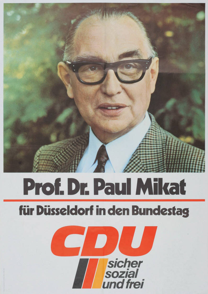 Prof. Dr. Paul Mikat für Düsseldorf in den Bundestag CDU sicher sozial und frei Plakatart: Kandidaten-/Personenplakat mit Porträt Auftraggeber: CDU-Bundesgeschäftsstelle, Abt. Öffentlichkeitsarbeit, Bonn Objekt-Signatur: 10-001: 2462 Bestand: Plakate zu Bundestagswahlen (10-001) GliederungBestand10-18: Plakate zu Bundestagswahlen (10-001) » Die 9. Bundestagswahl am 5. Oktober 1980 » CDU » Mit Porträtfoto Lizenz: KAS/ACDP 10-001: 2462 CC-BY-SA 3.0 DE